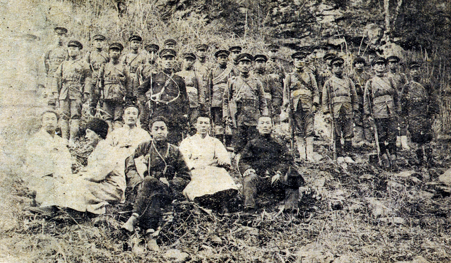 大韓民国臨時政府駐満参議府隊員